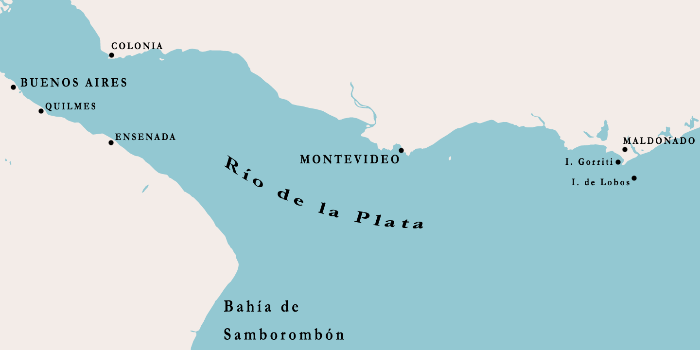 El Río de la Plata con los principales escenarios de las invasiones inglesas.